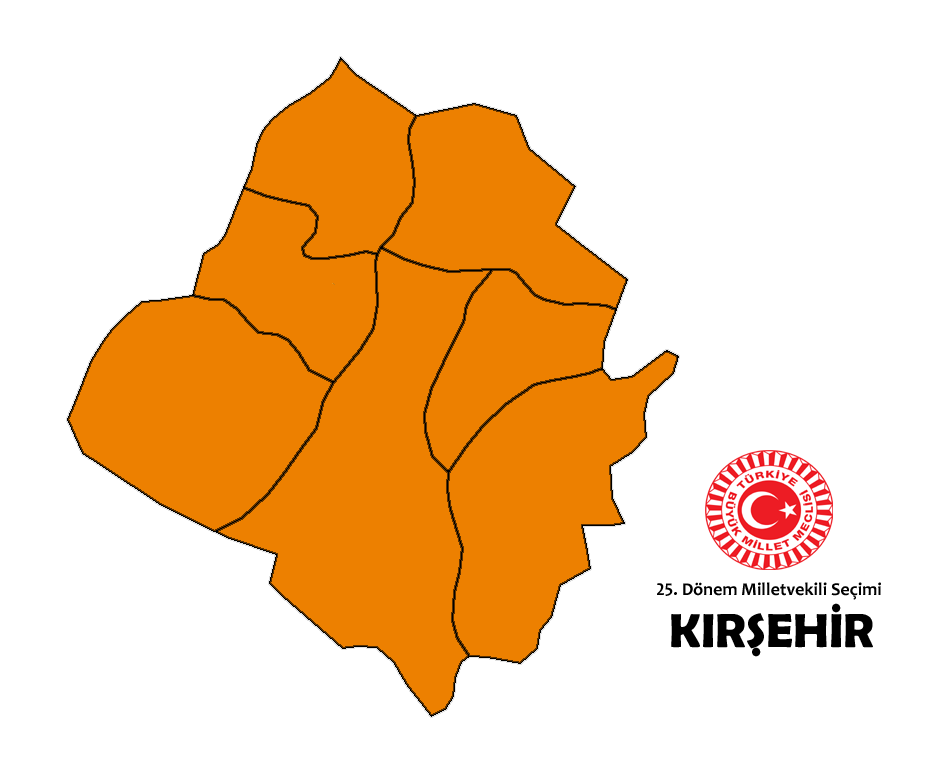 2015 genel seçim sonuçları